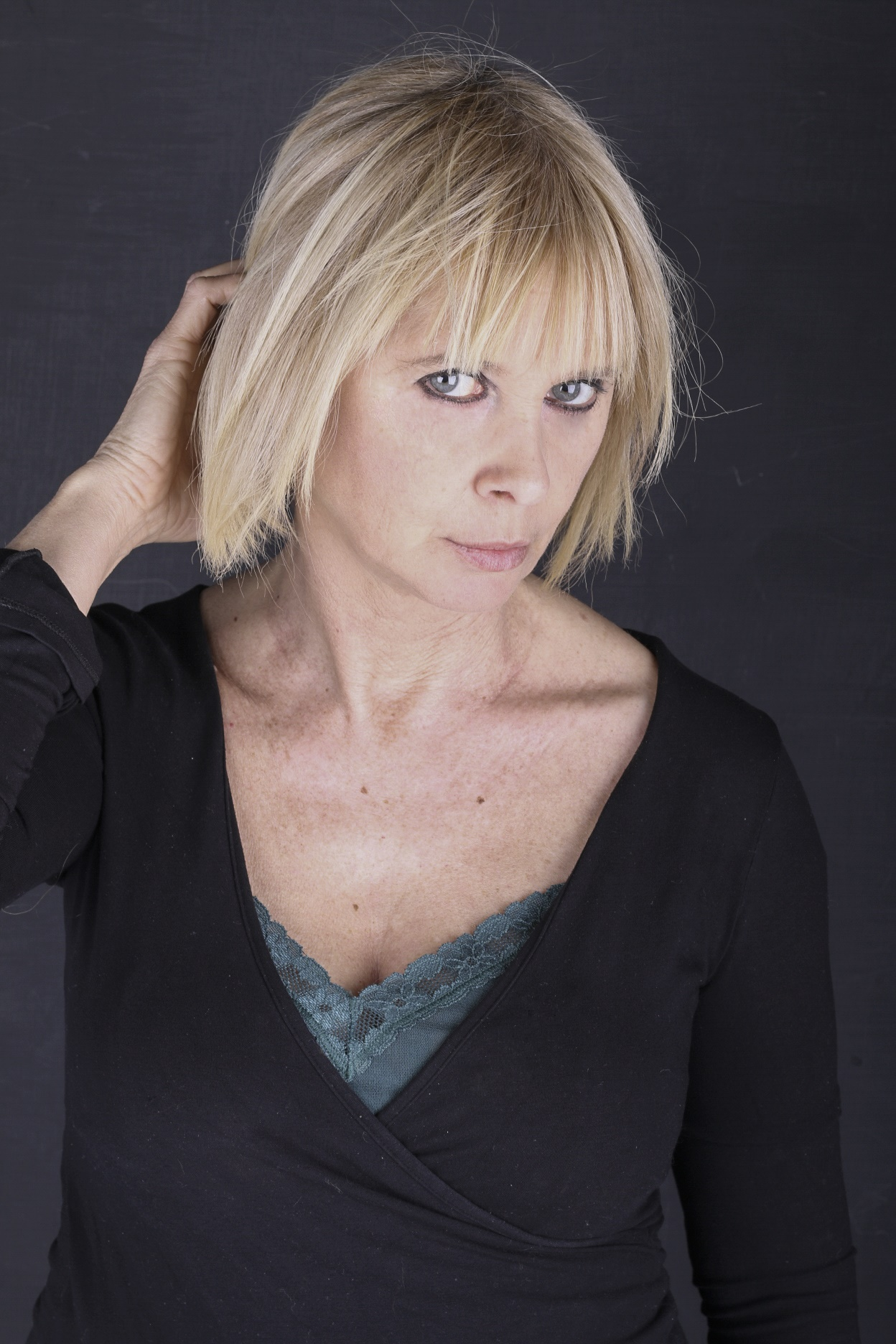 Jo Chiarello